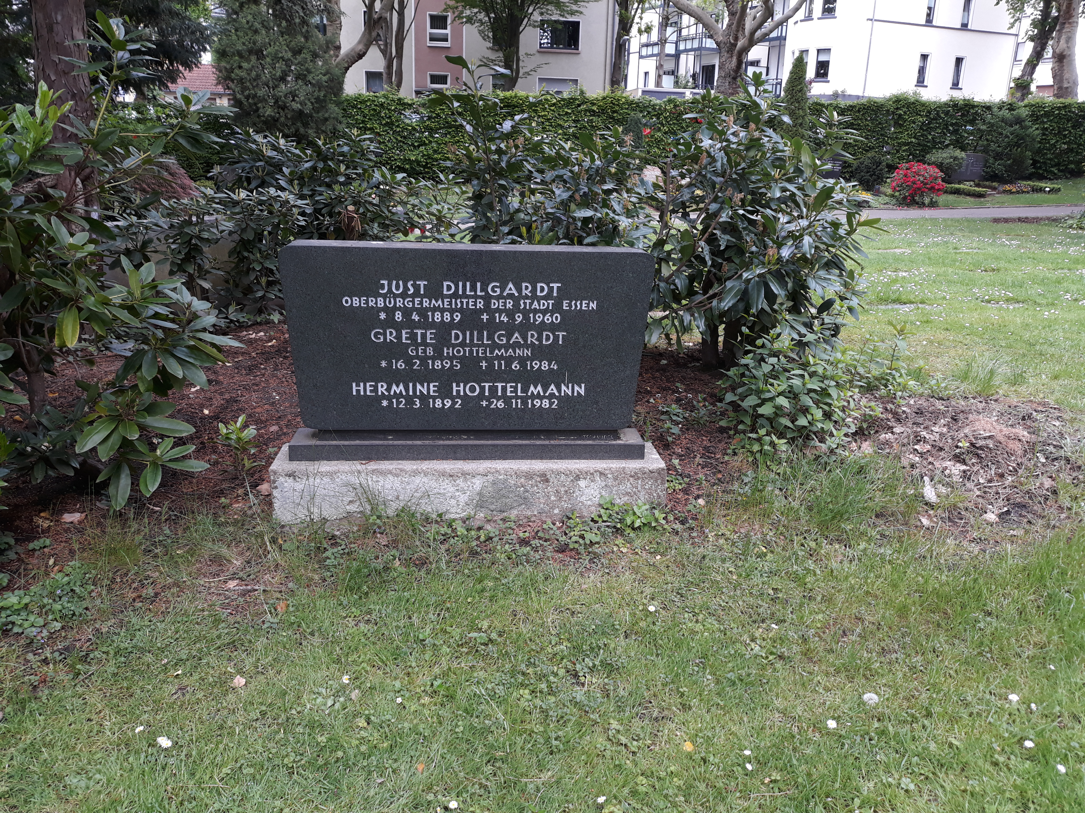 Das Grab des nationalsozialistischen Politikers und Essener Oberbürgermesiters Just Dillgardt im Famiiengrab mit Ehefrau Grete und Schwägerin Hermine auf dem Ostfriedhof Essen.